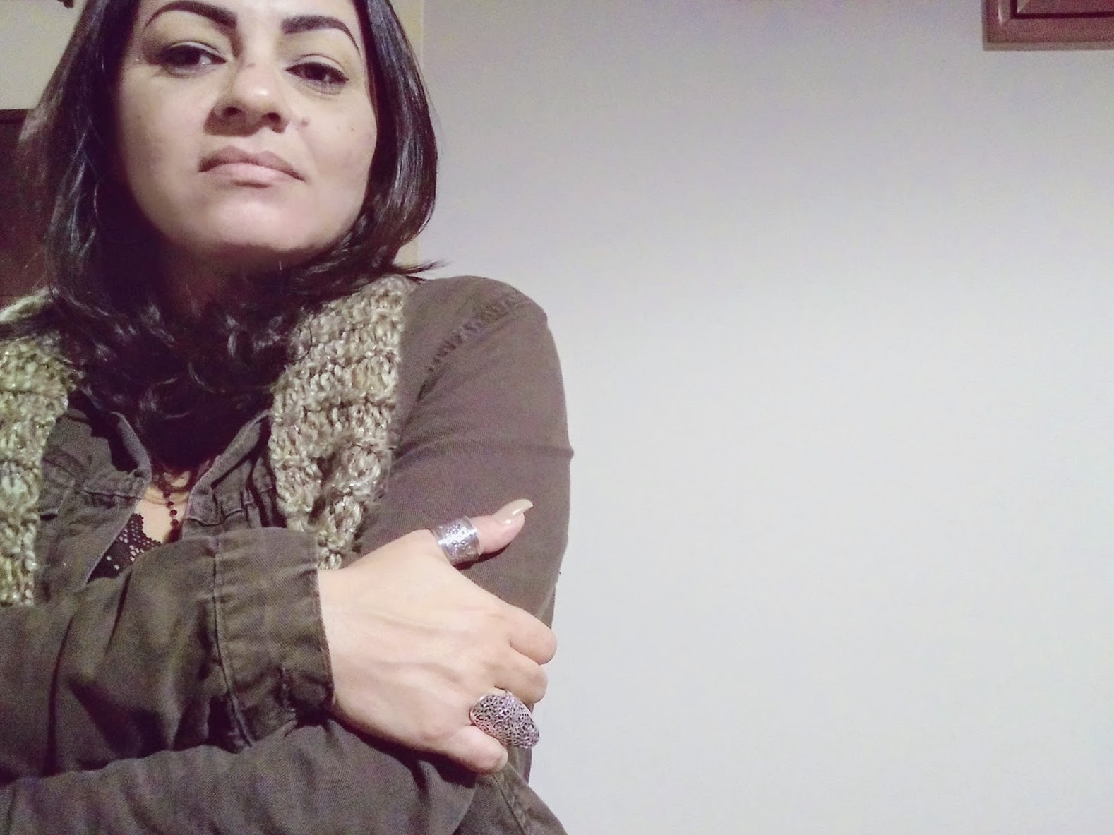 Escritora brasileira.